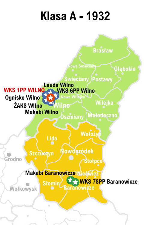 Uczestnicy Rozgrywek Wil.OZPN klasa A - rok 1932